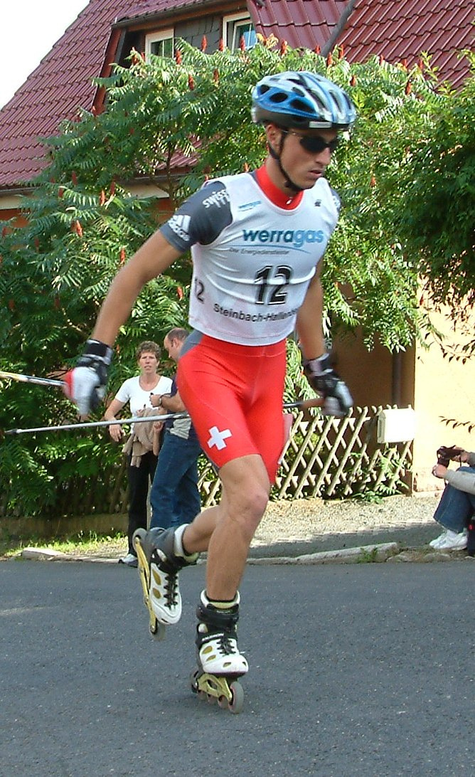 Andy Hartmann during the Sommer Gand Prix in Steinbach-Hallenberg